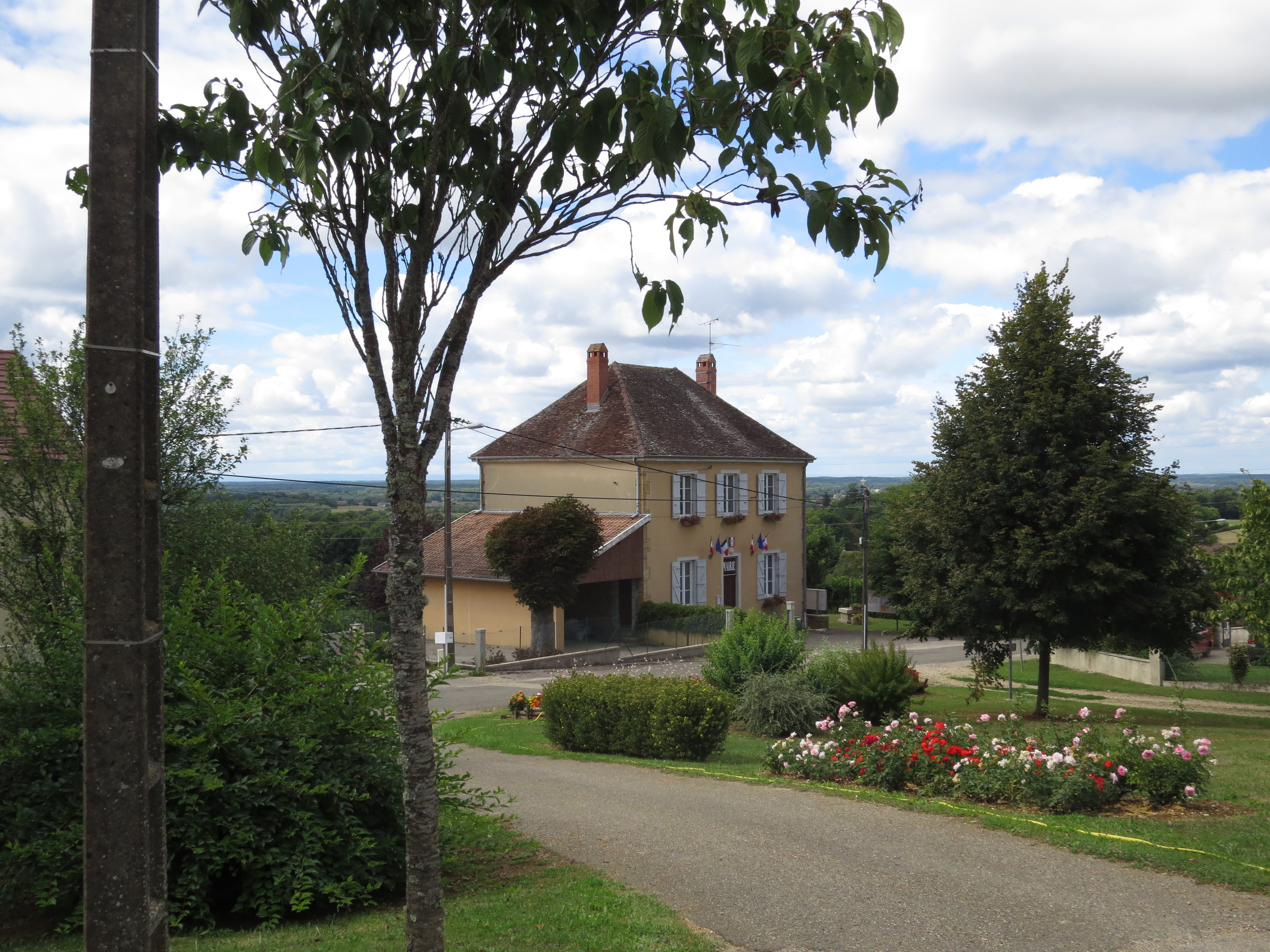 Mairie